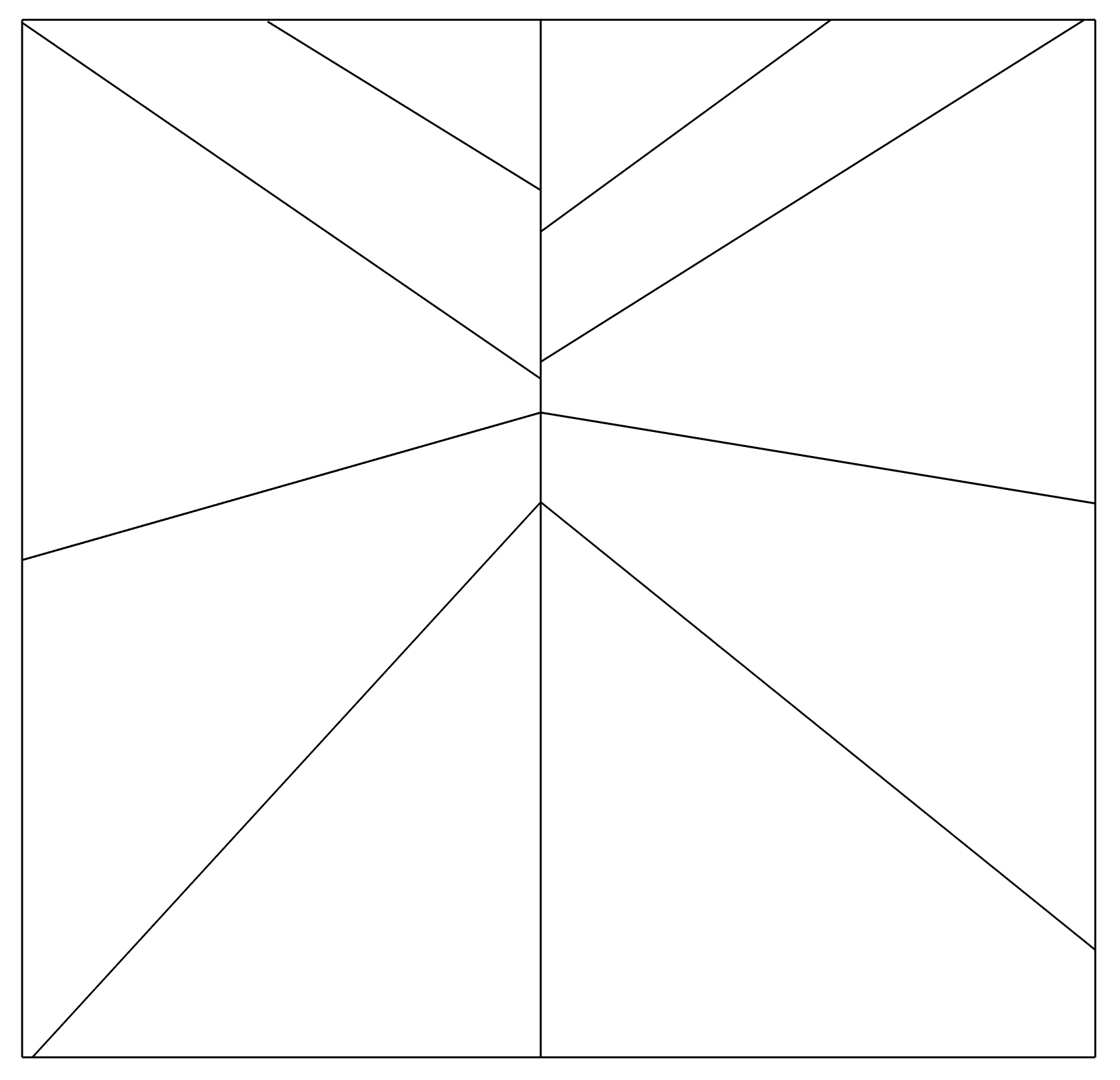 Estrutura de espinha de peixe da pintura "Passages d'outremer" de Sébastien Mamerot.